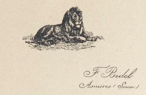 Carte de visite du dompteur François Bidel (1839-1909), à son adresse, Asnières-sur-Seine.